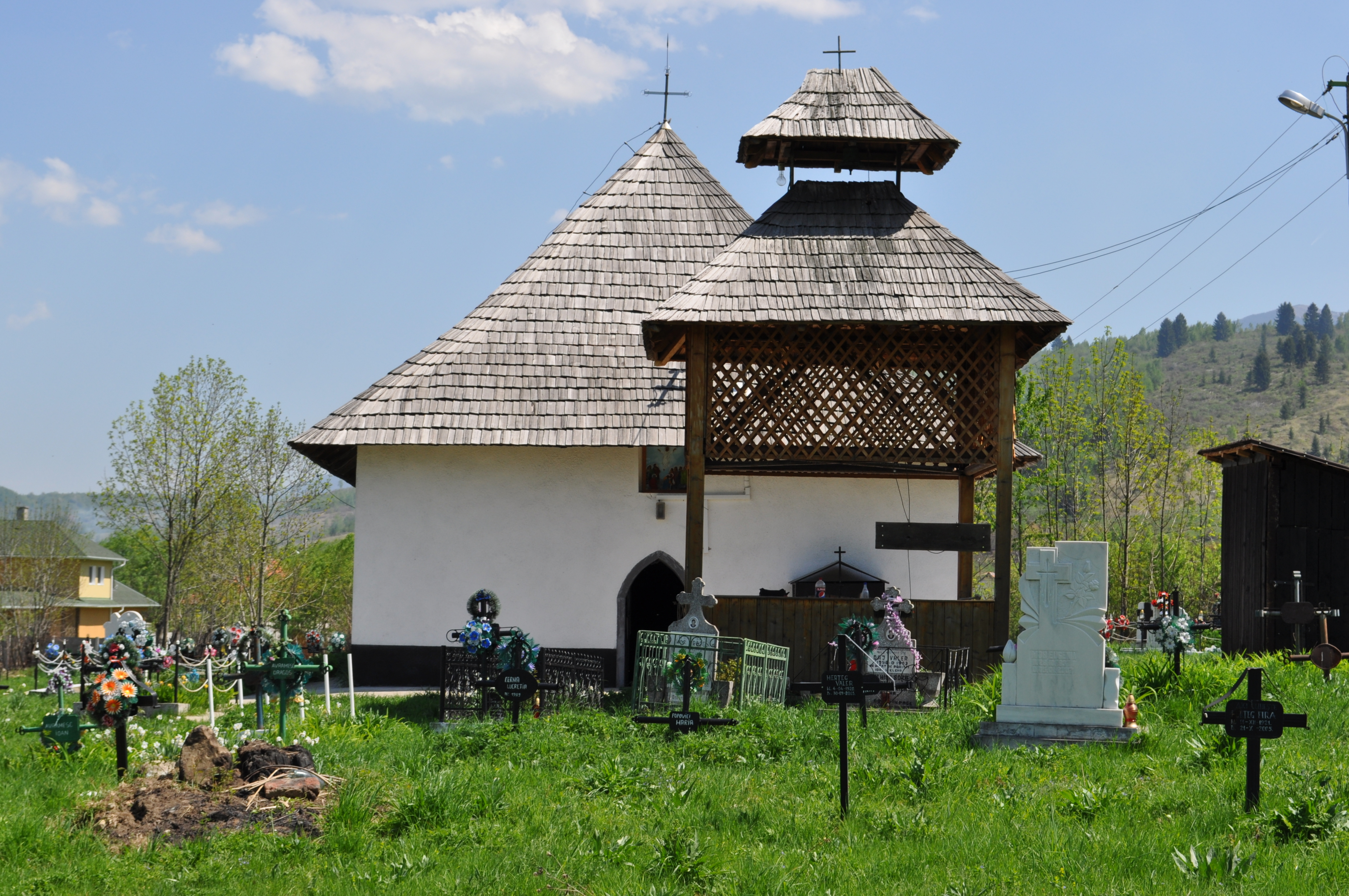 Biserica "Înălţarea Domnului" , sat NUCŞOARA; comuna SĂLAŞU DE SUS